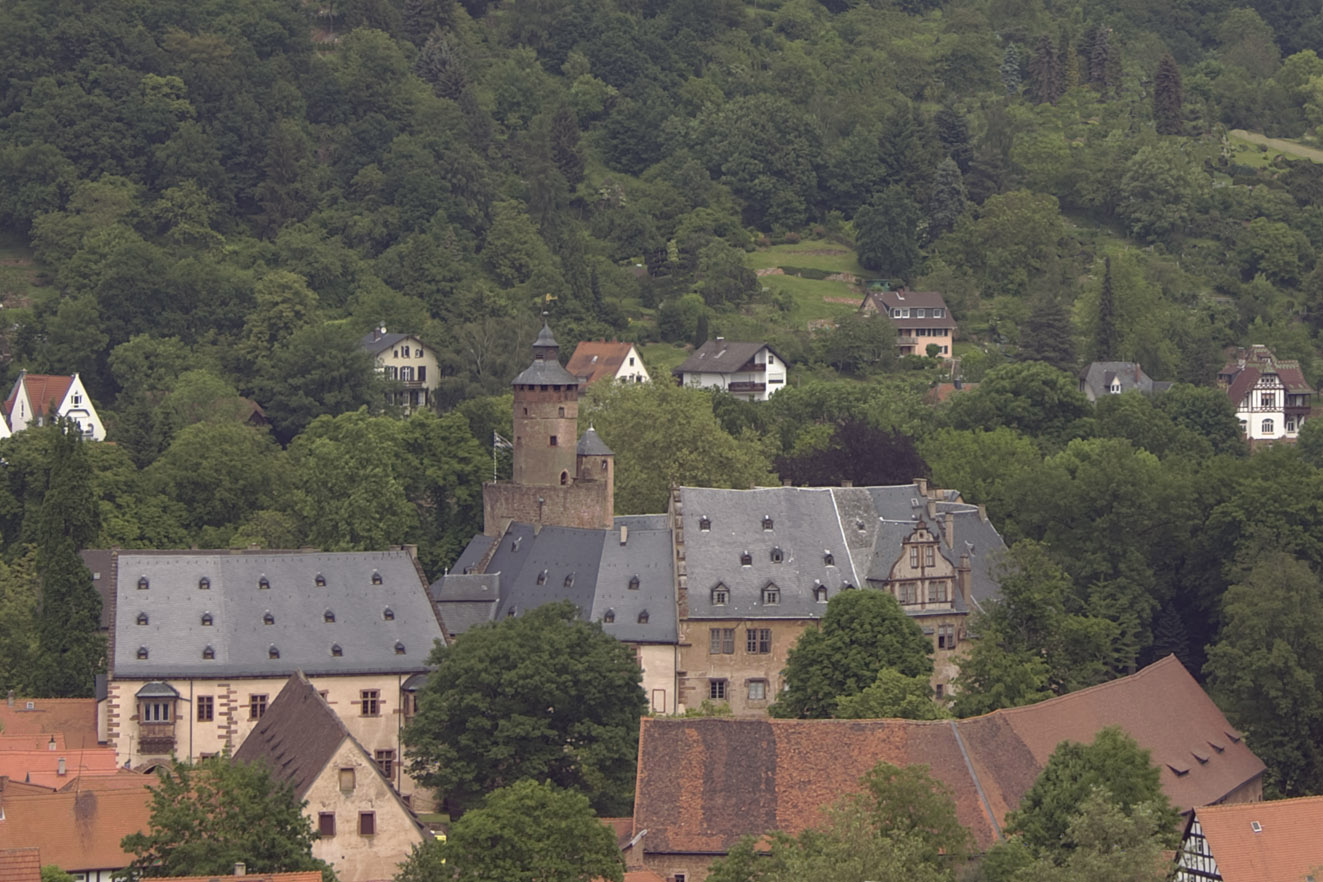 Das Schloss in Büdingen, Deutschland